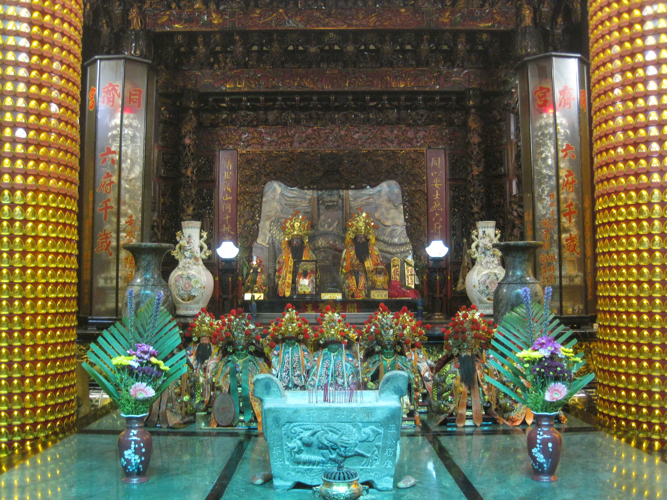 中文（台灣）: 新營同濟宮後殿